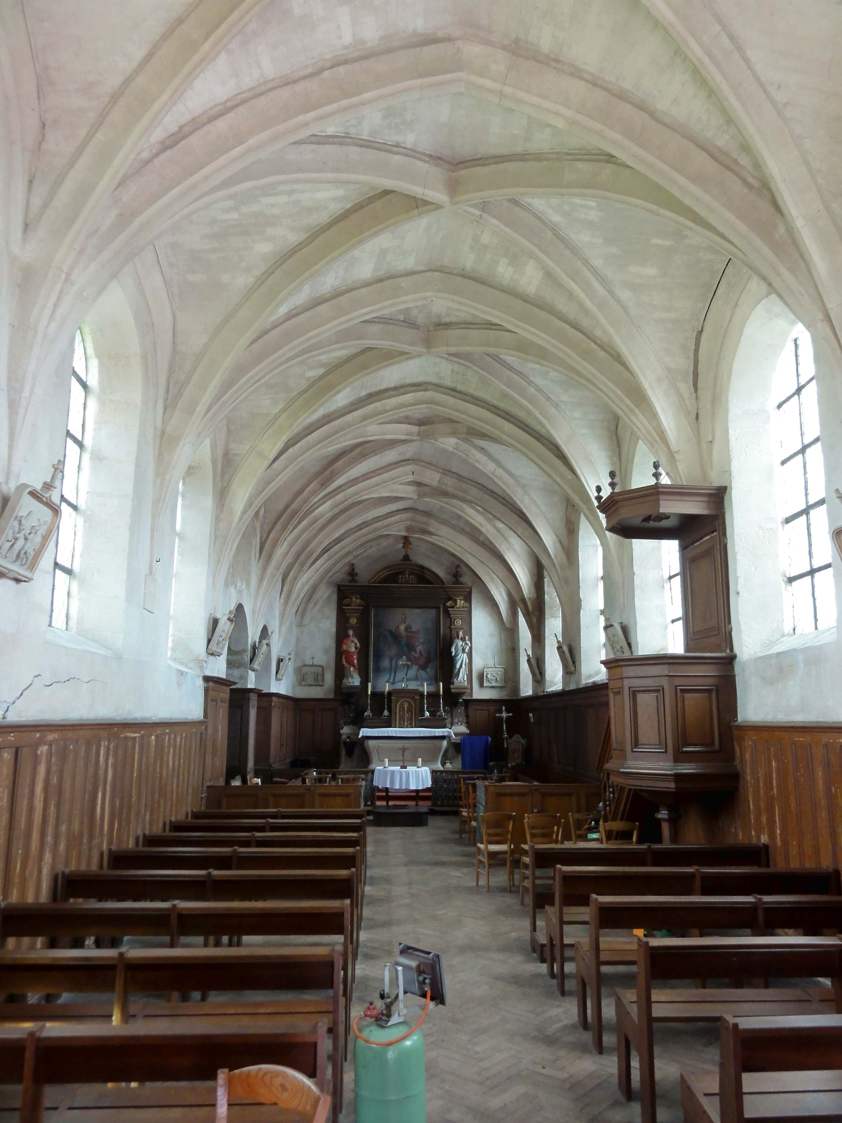 Interieur de l'église (voir titre).